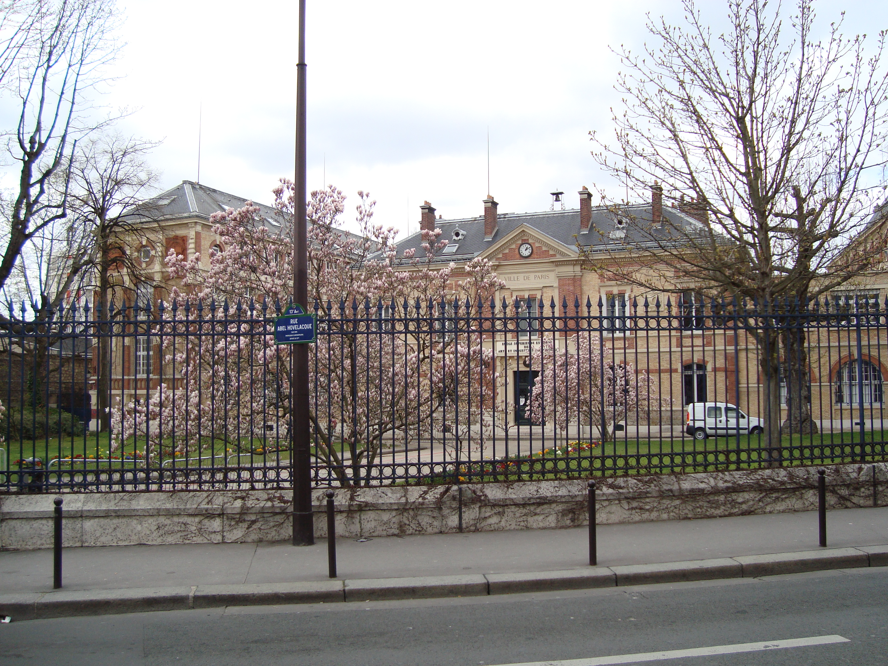 Ecole d'Estienne de graphisme et de design, boulevard Auguste-Blanqui à Paris